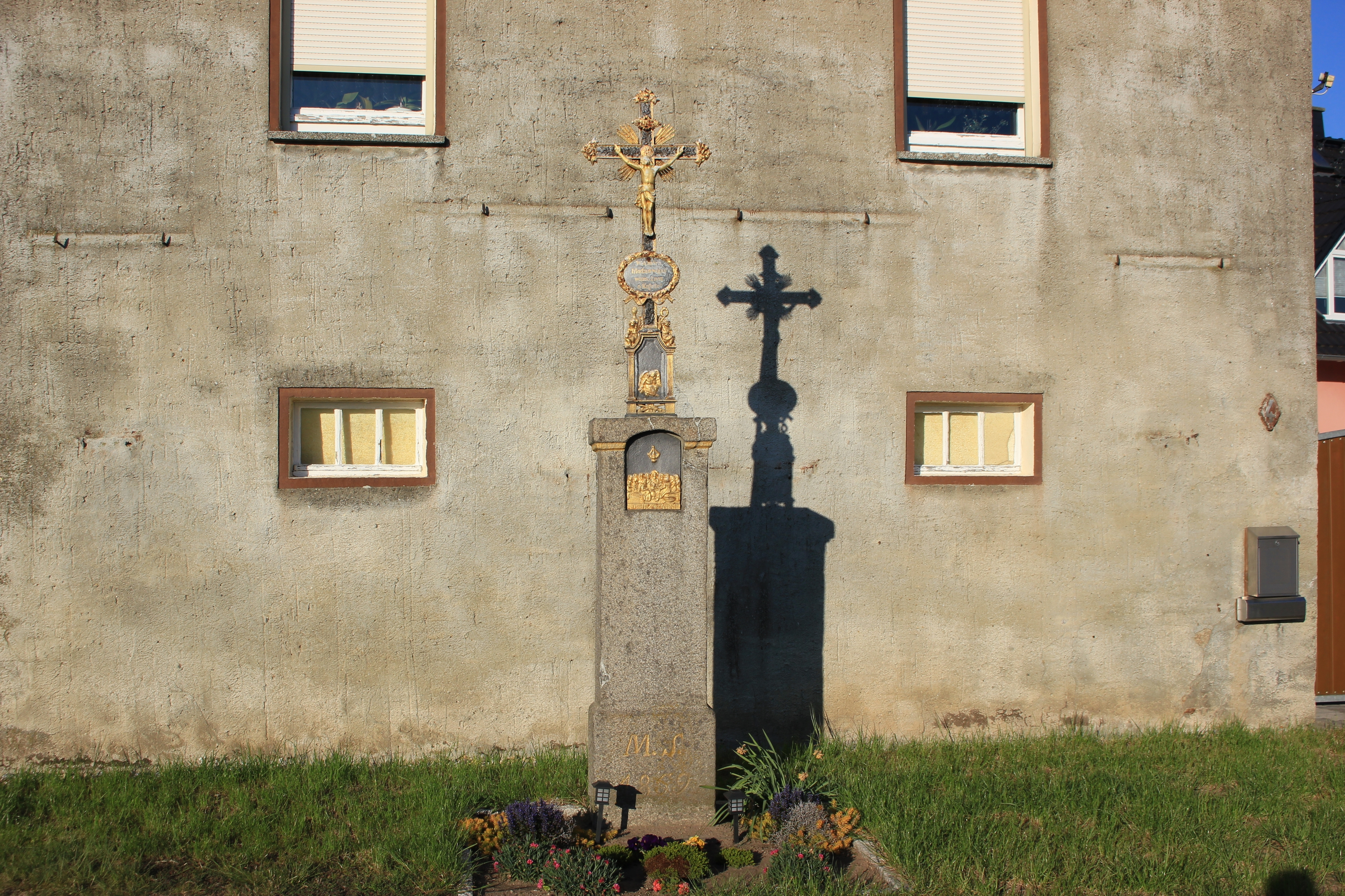 Hornjoserbsce: Swjaty křiž w Smjerdźacej při Šunowskej čo. 4 (kulturny pomnik)